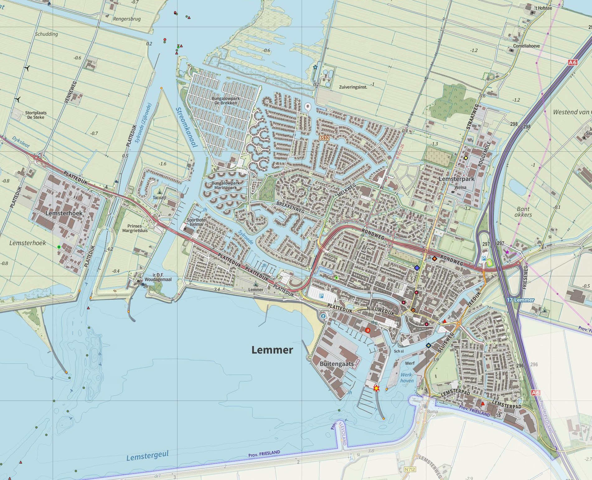 Kaart van Lemmer